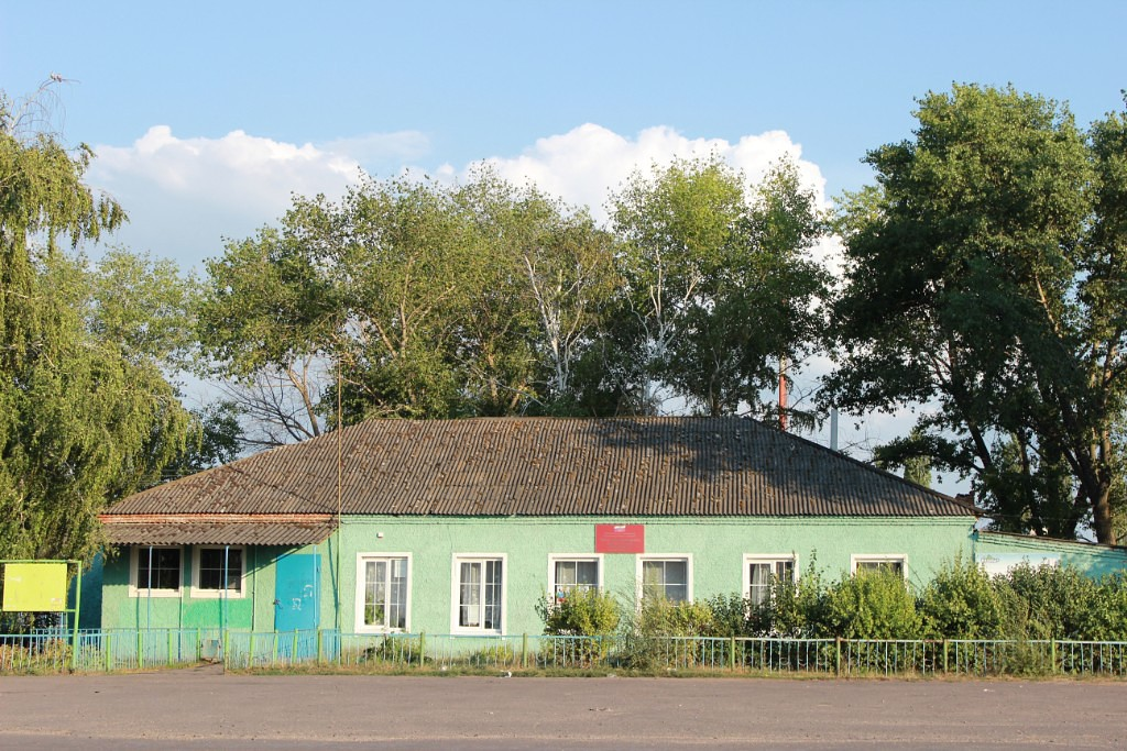 Боевский СДК